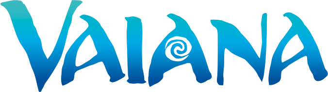 Logo zum Film Bernardo 3.